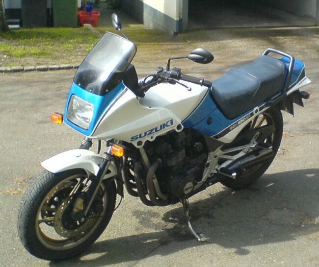 Suzuki GSX 550 Baujahr 1984 oder 1985 ohne untere Verkleidung